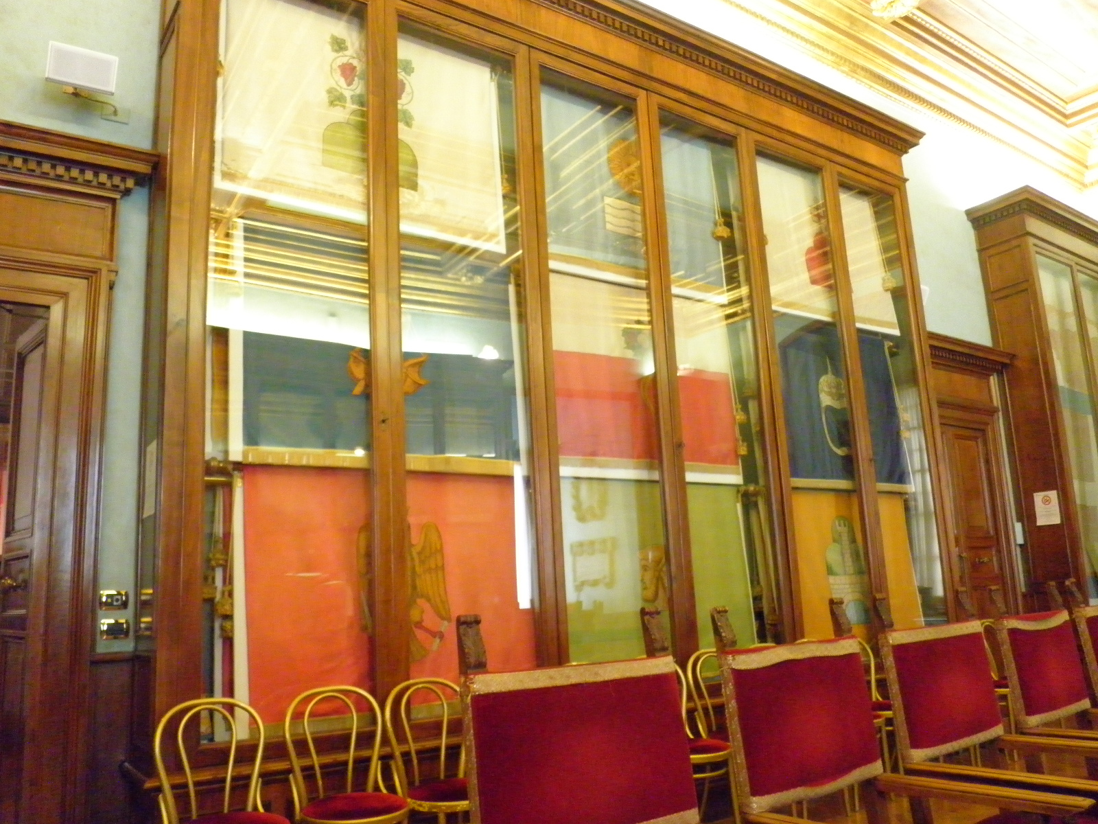 Roma, palazzo senatorio al Campidoglio. Sala delle bandiere. Bandiere cittadine: stendardi dei rioni antichi.